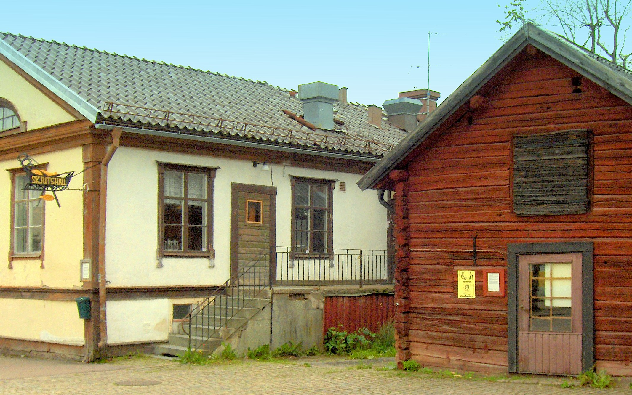 Tims lada (t.h.) i centrum av Norberg tätort, Norbergs kommun, Västmanlands län, Sverige. Till vänster Näbbgården, på 1600-talet prästboställe, också tididigare gästgiveri.